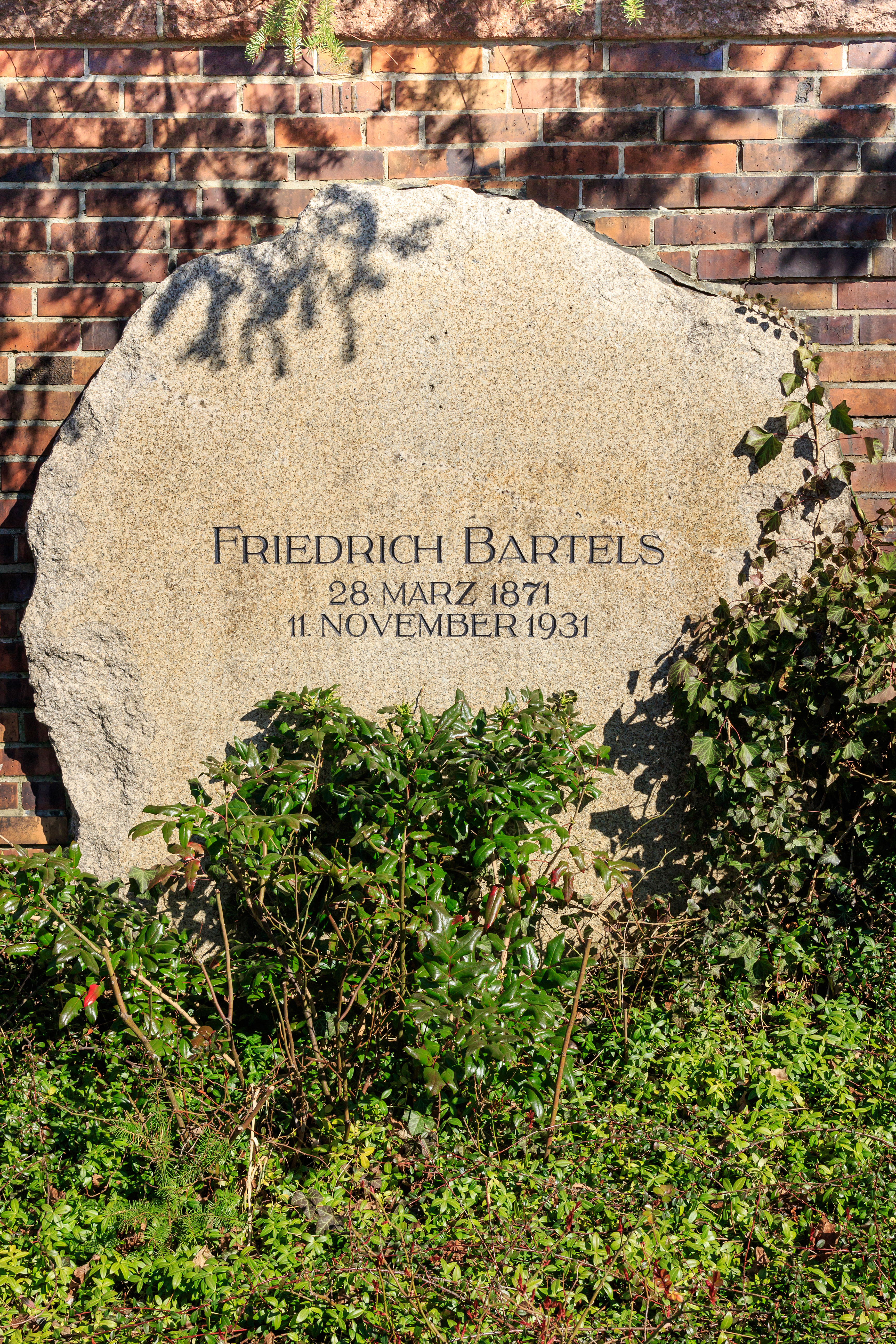 Zentralfriedhof Friedrichsfelde, Berlin-Lichtenberg. Gedenkstätte der Sozialisten, Grab von Friedrich Bartels.